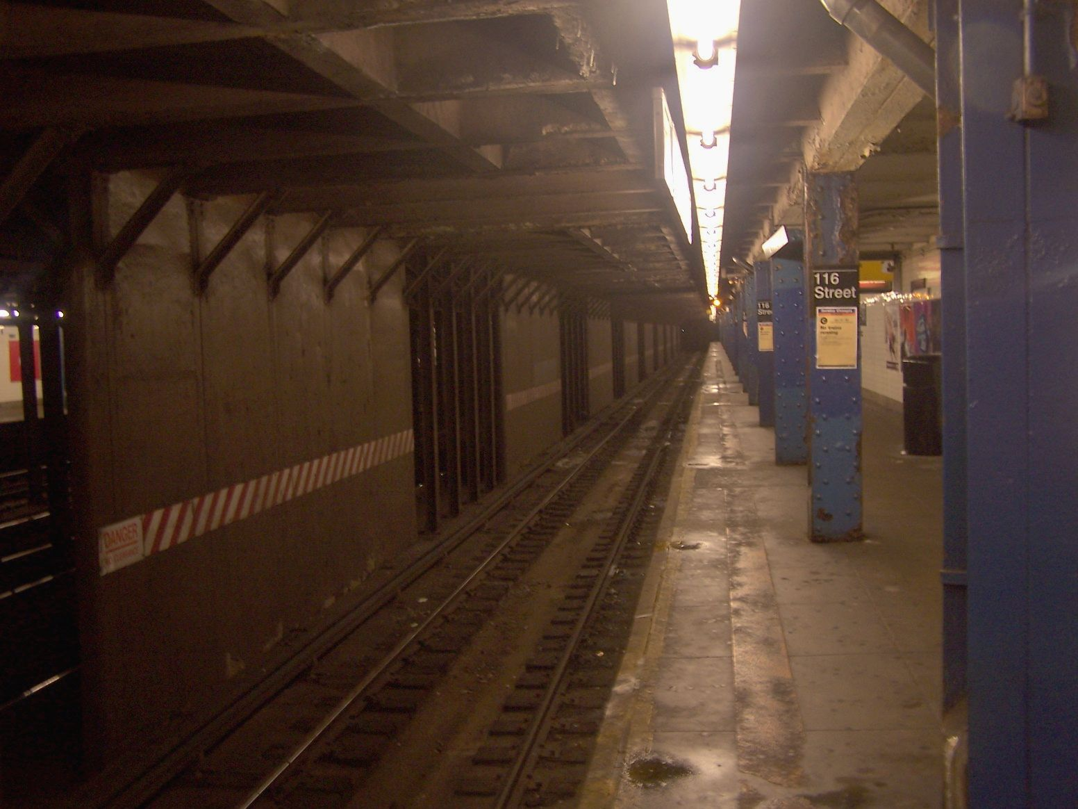 temps 291